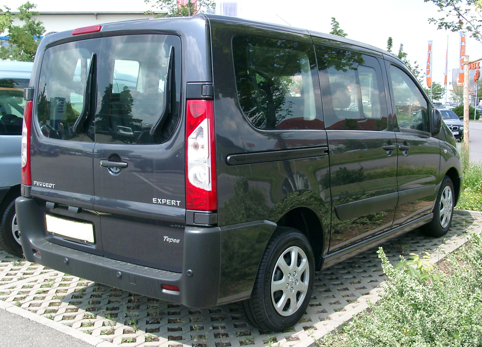 Peugeot Expert